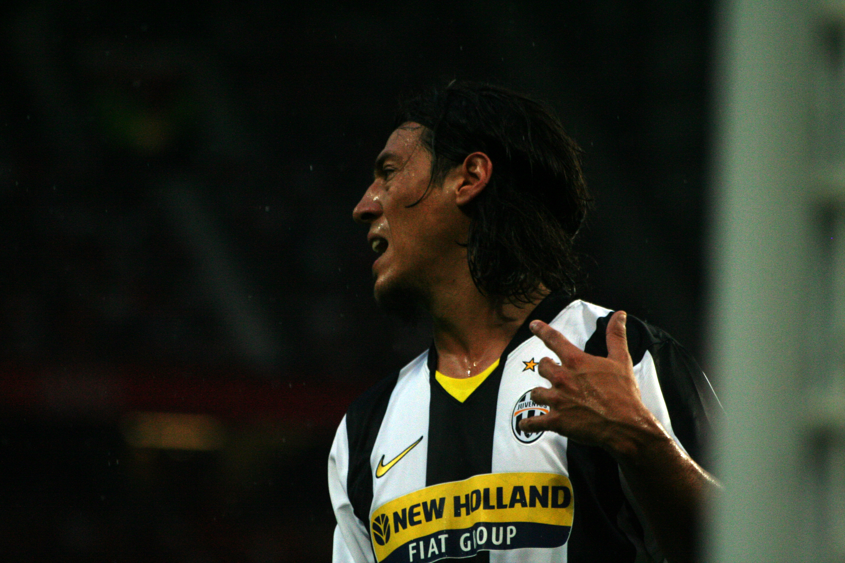 Il centrocampista argentino, naturalizzato italiano, Mauro Germán Camoranesi durante un'amichevole estiva tra Manchester United e Juventus disputata all'Old Trafford di Manchester il 6 agosto 2008.